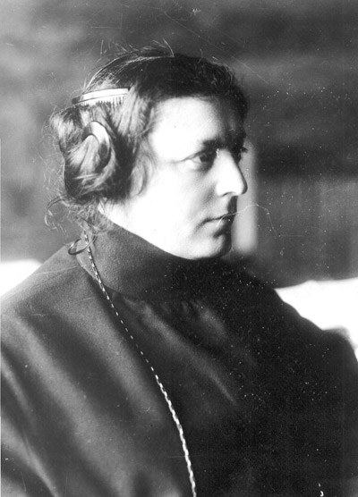 Foto de Olga Kameneva de 1926